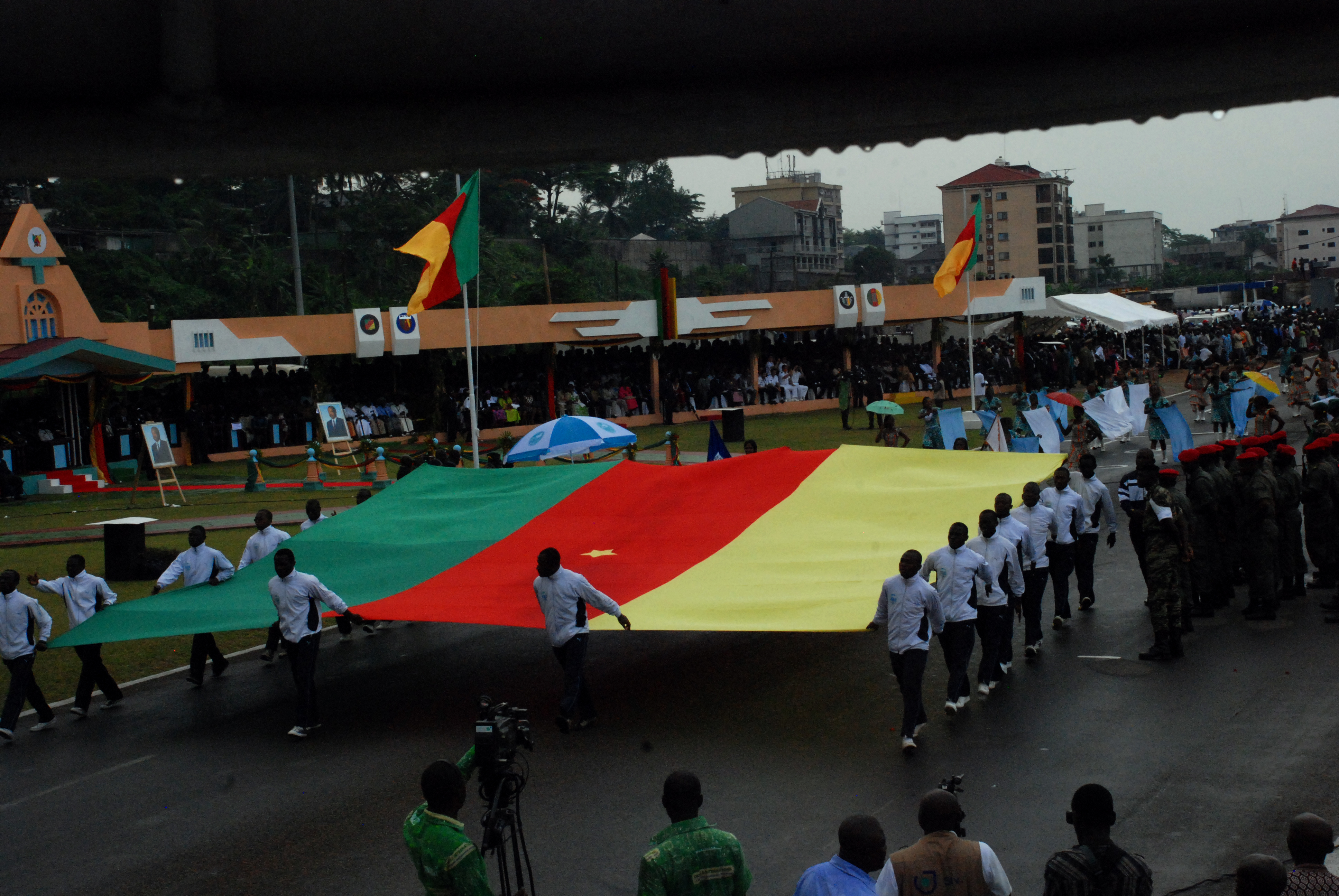 les étudiants et les militantes de parti politique transportant le drapeau du Cameroun et le pagne des femmes du parti politique du président Paul Biya lors du défilé de la fête nationale du 20 mai à Douala au Cameroun. This is an image with the theme "Africa on the Move or Transport" from: Cameroon